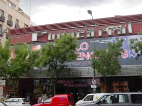 El desaparecido teatro Fuencarral (Madrid, España) en diciembre de 2003